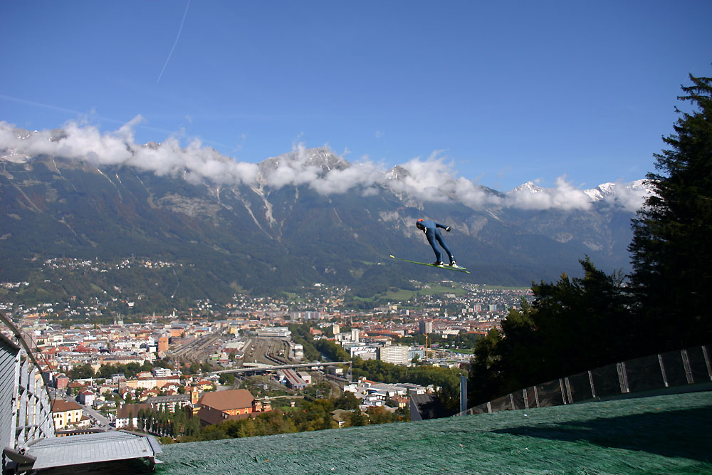 Skisprungschanze Bergisel Innsbruck